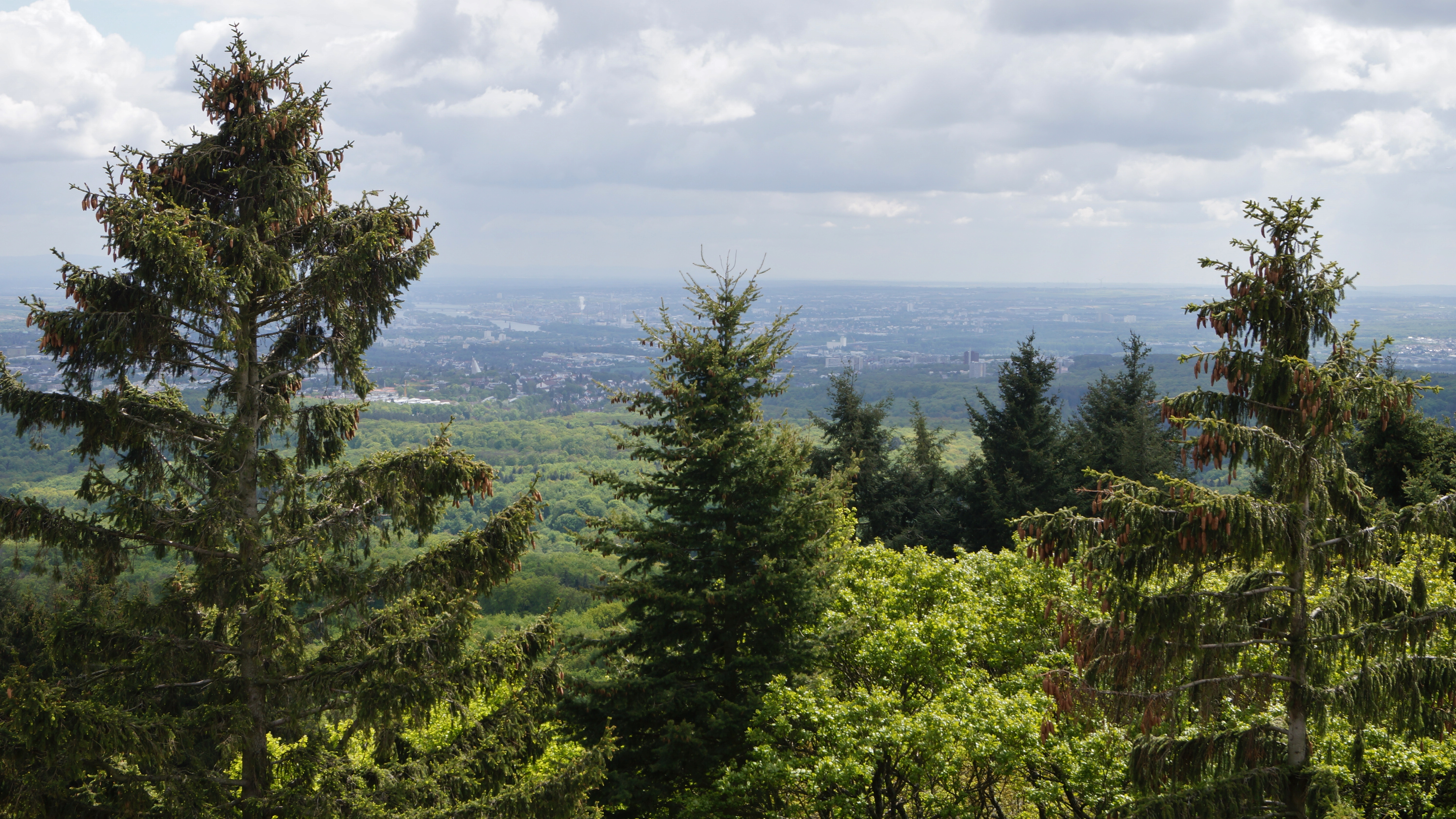 Blick vom Kaiser-Wilhelm-Turm auf den Gipfelbereich des Schläferskopfs Richtung Südsüdost über Schierstein und den Rhein nach Mainz in Rheinland-Pfalz.